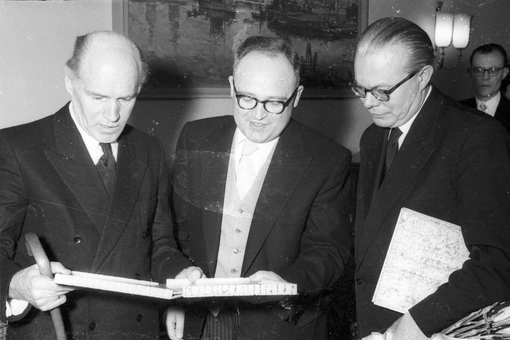 Kultusminister Edo Osterloh (Bildmitte) übergibt den Preis an den Maler Friedrich Karl Gotsch (links) und an den Komponisten Walter Kraft (rechts).